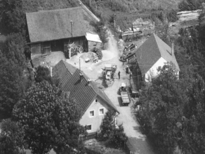 Dorfschmiede von A. Holmer um 1969, Schierling/Eggmühl, Deutschland